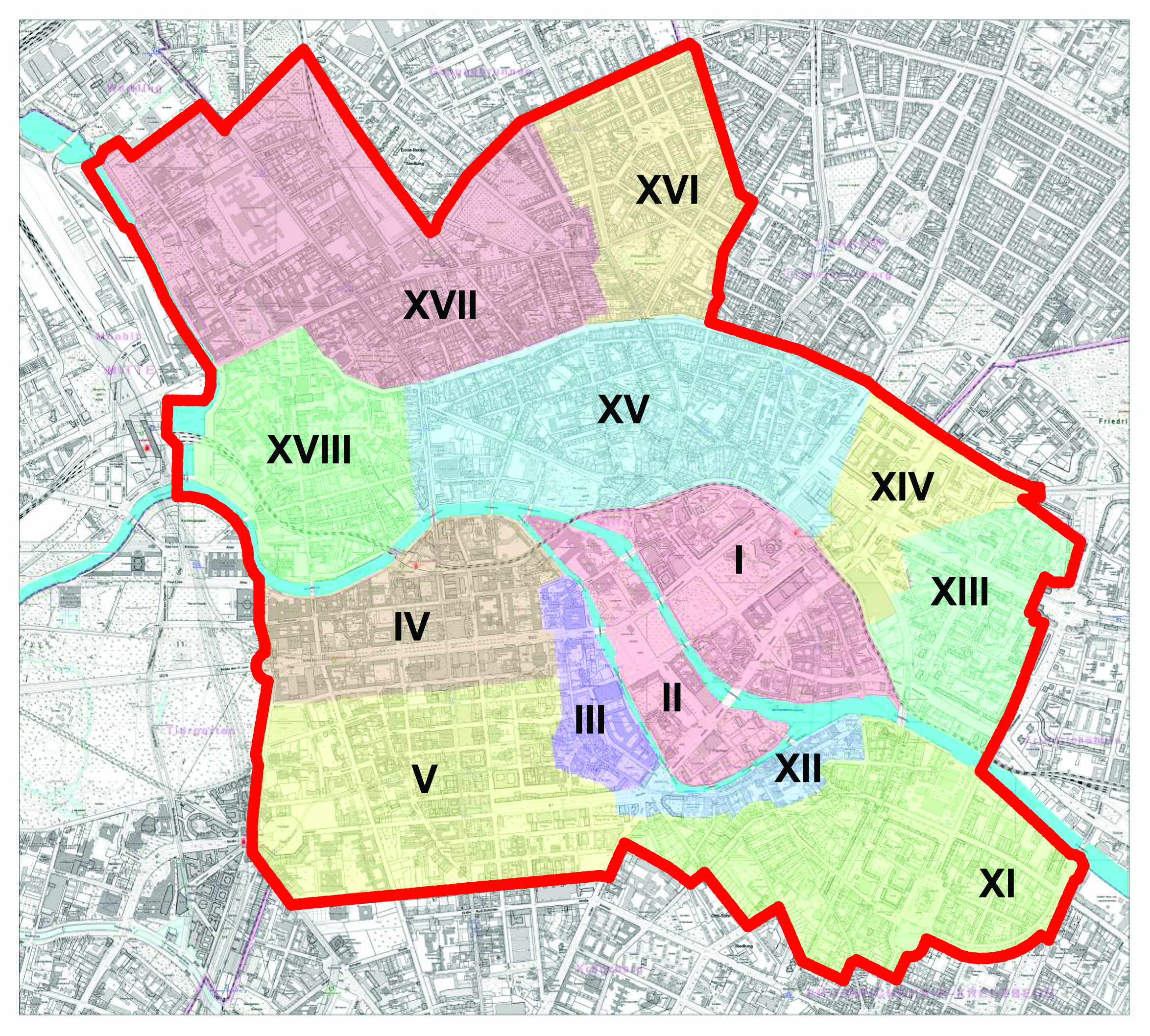 Berlin, historische Stadtteile - Karte